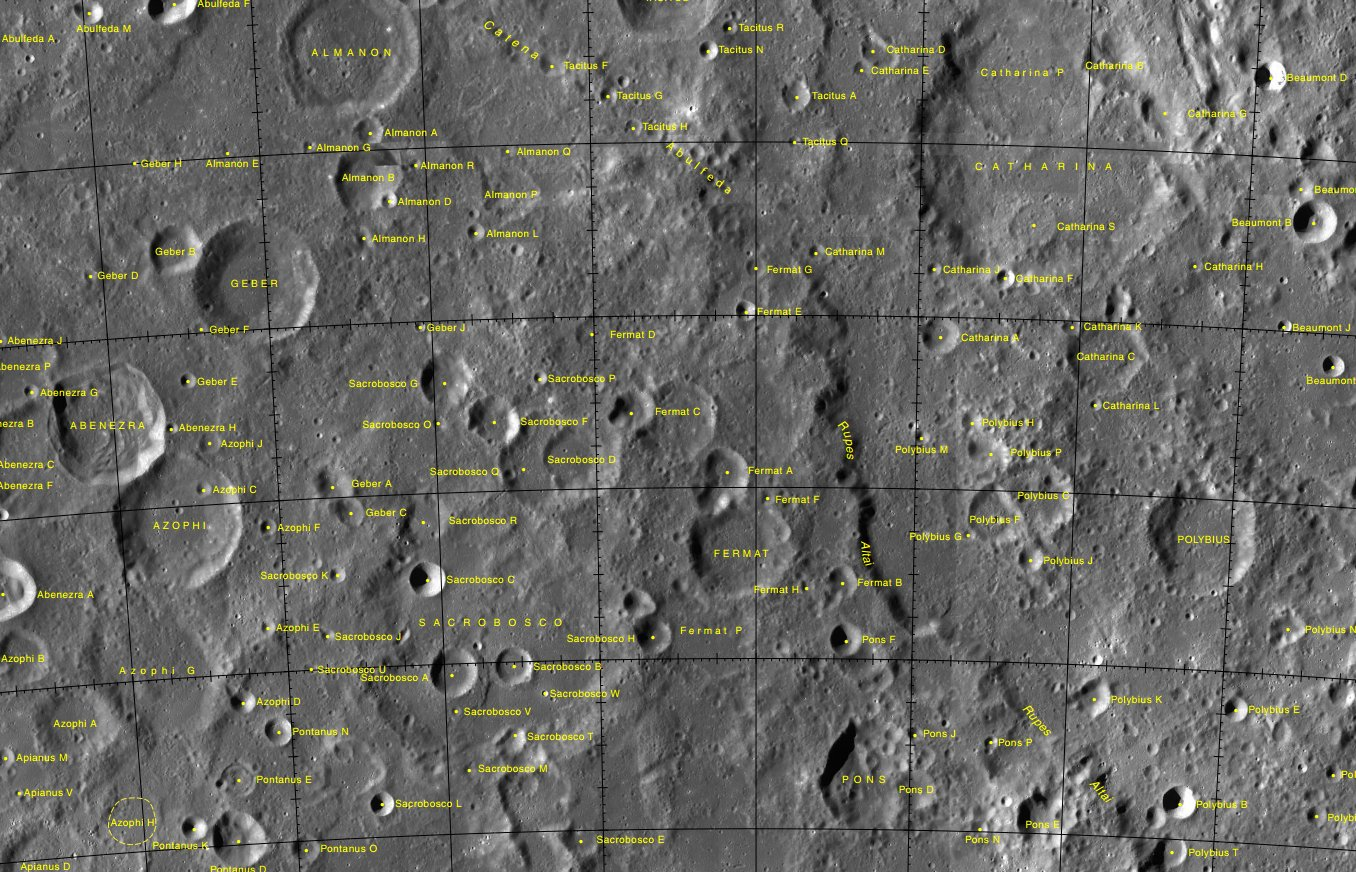 Cráter lunar Fermat. Localización. (Imagen LROC)